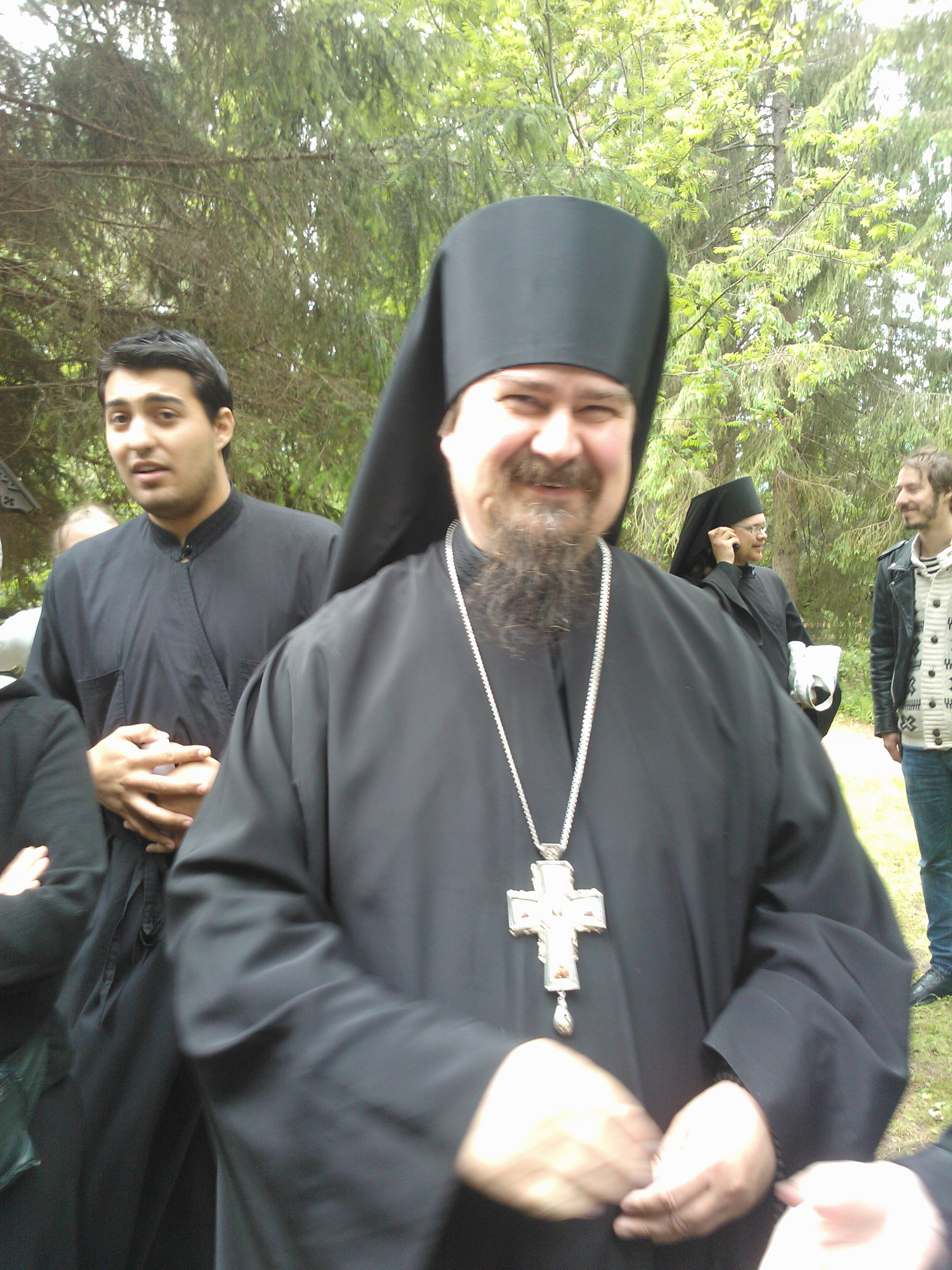 Архимандрит Сергий (Райаполви)